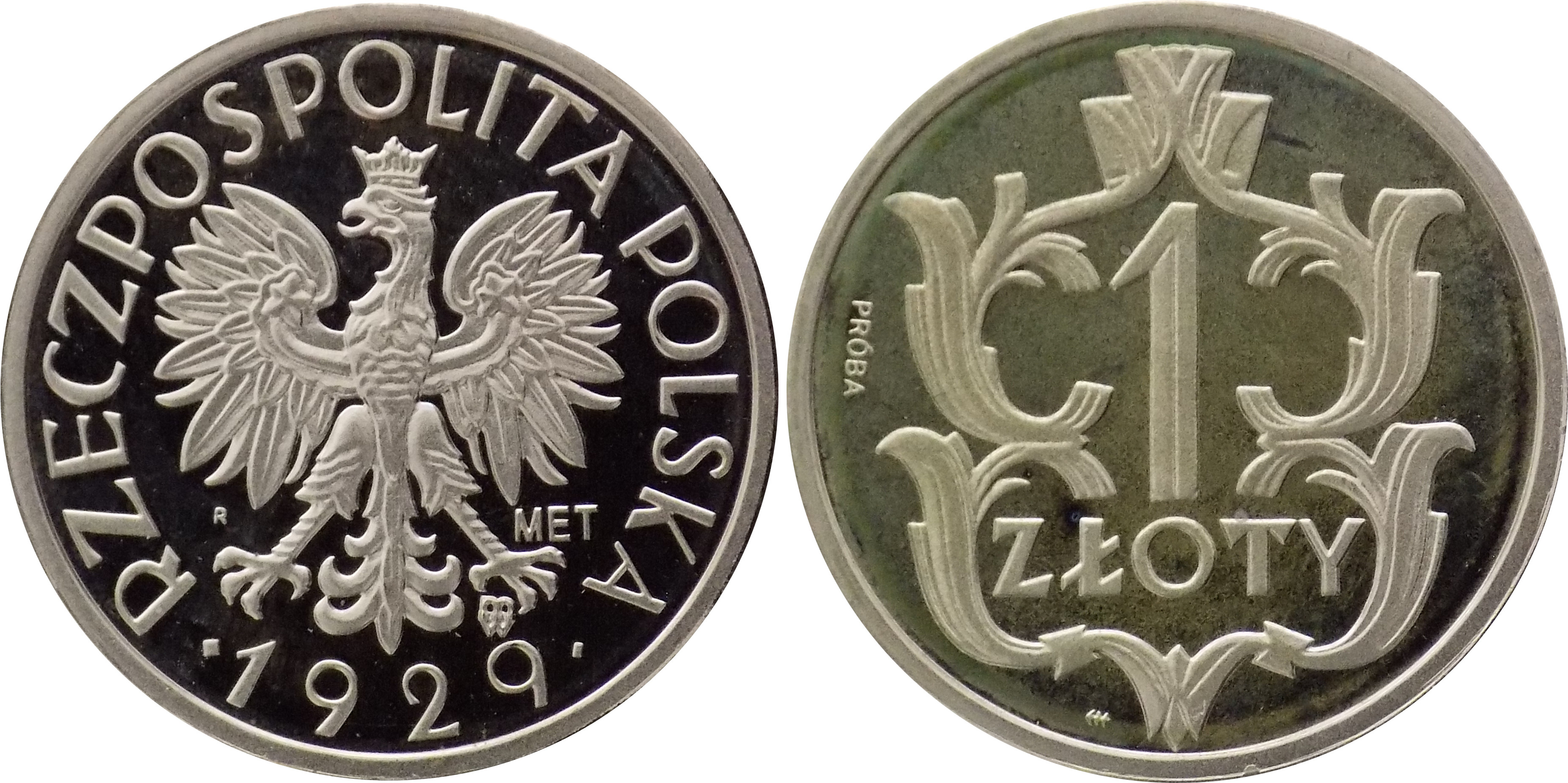 Replika 1 złoty 1929 PRÓBA